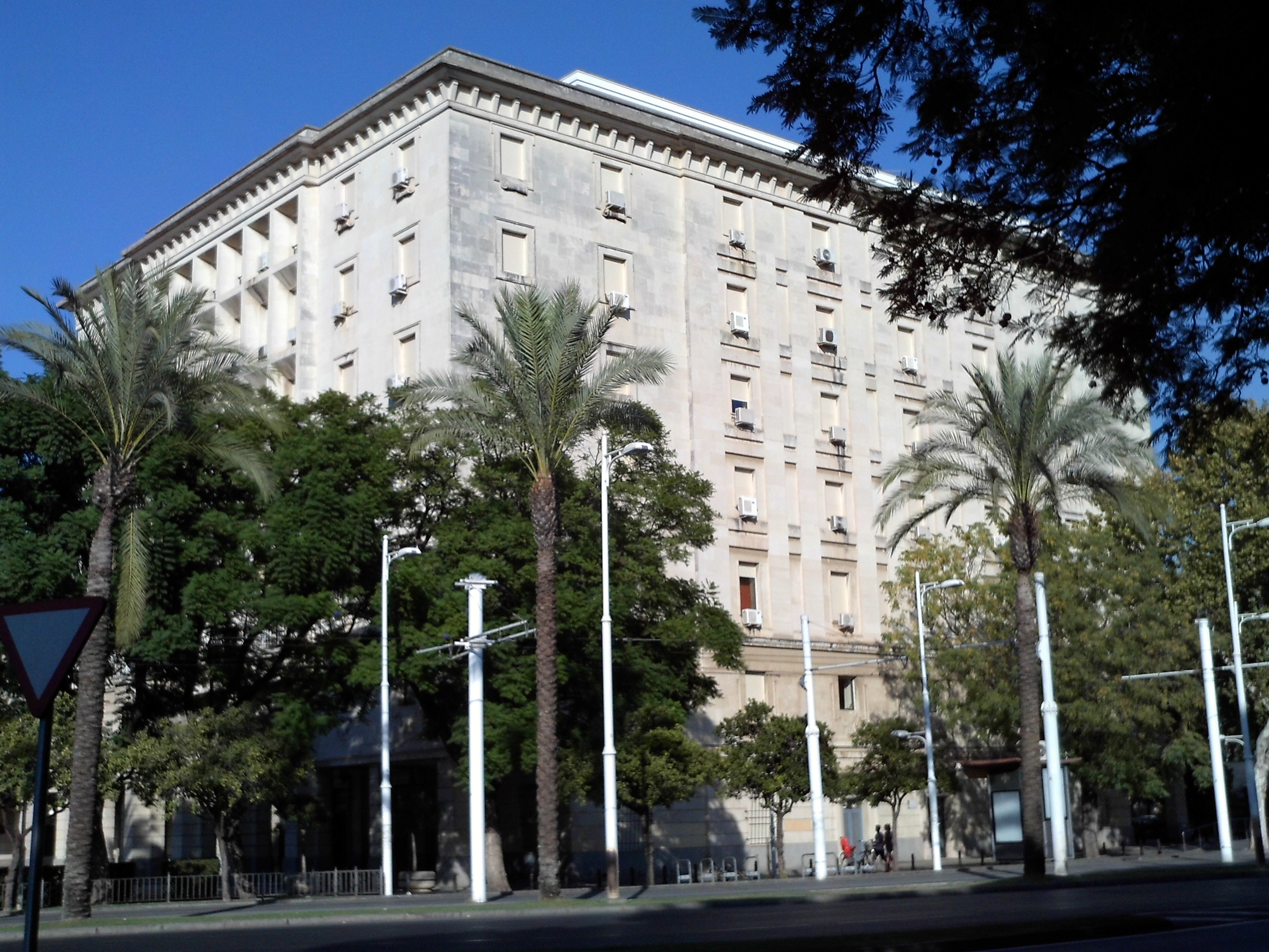 Palacio de Justicia de Sevilla. Andalucía, España.